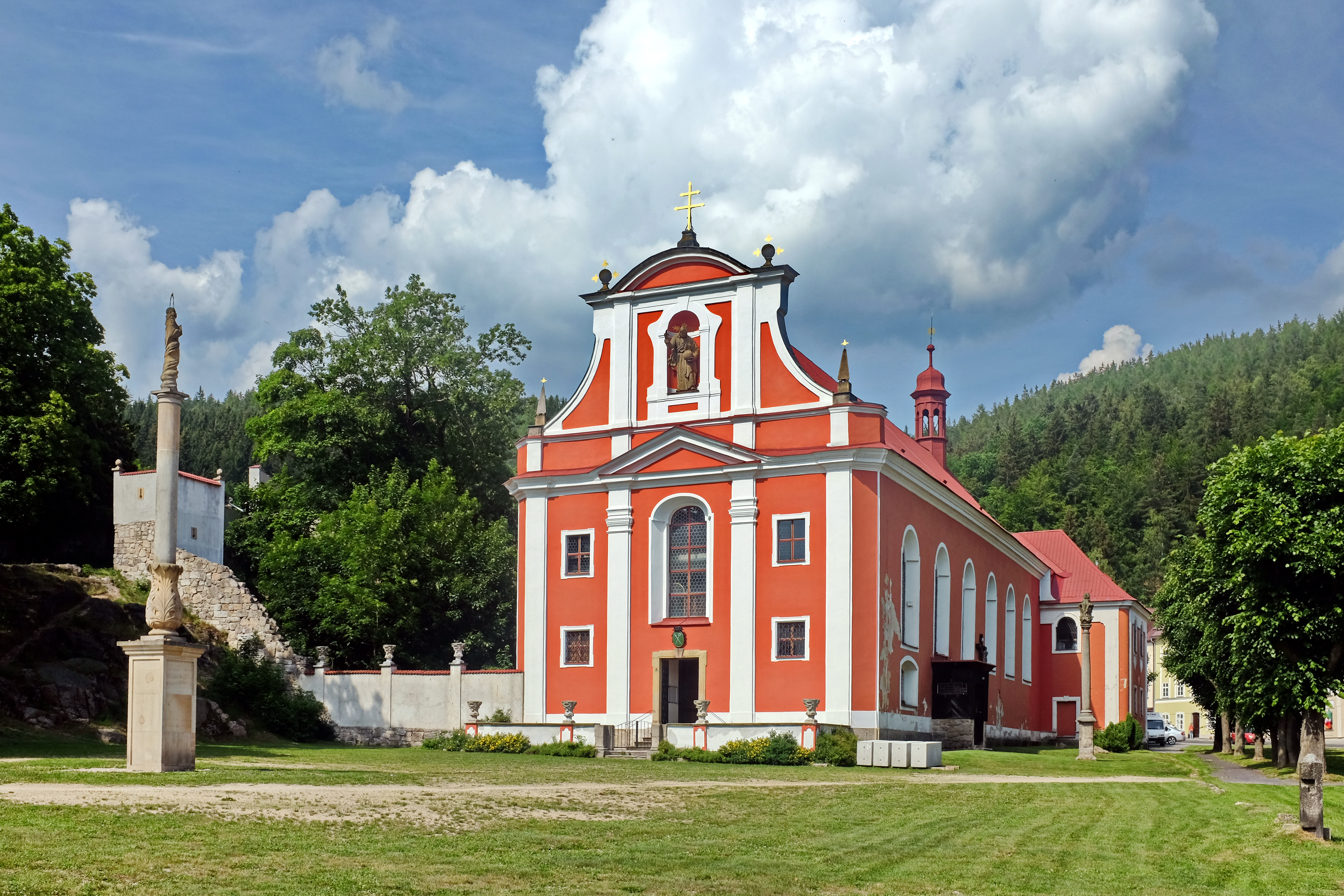 Kostel svatého Martina, Nejdek.